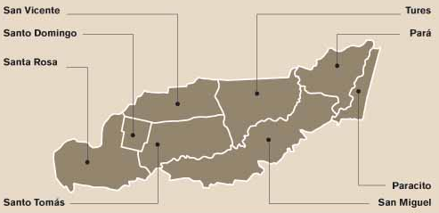 Mapa de los distritos del cantón de Santo Domingo, provincia de Heredia, Costa Rica.